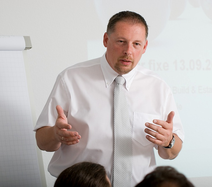 Klaus Gablenz, 2013